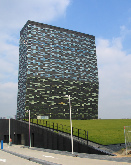 Het gebouw FiftyTwoDegrees in Nijmegen. Ontwerp van Francine Houben en Francesco Veenstra van Mecanoo Architecten Delft. Gereed gekomen in 2007. The building FiftyTwoDegrees in Nijmegen designed by Francine Houben and Francesco Veenstra (Mecanoo Architecten Delft). View from the North.